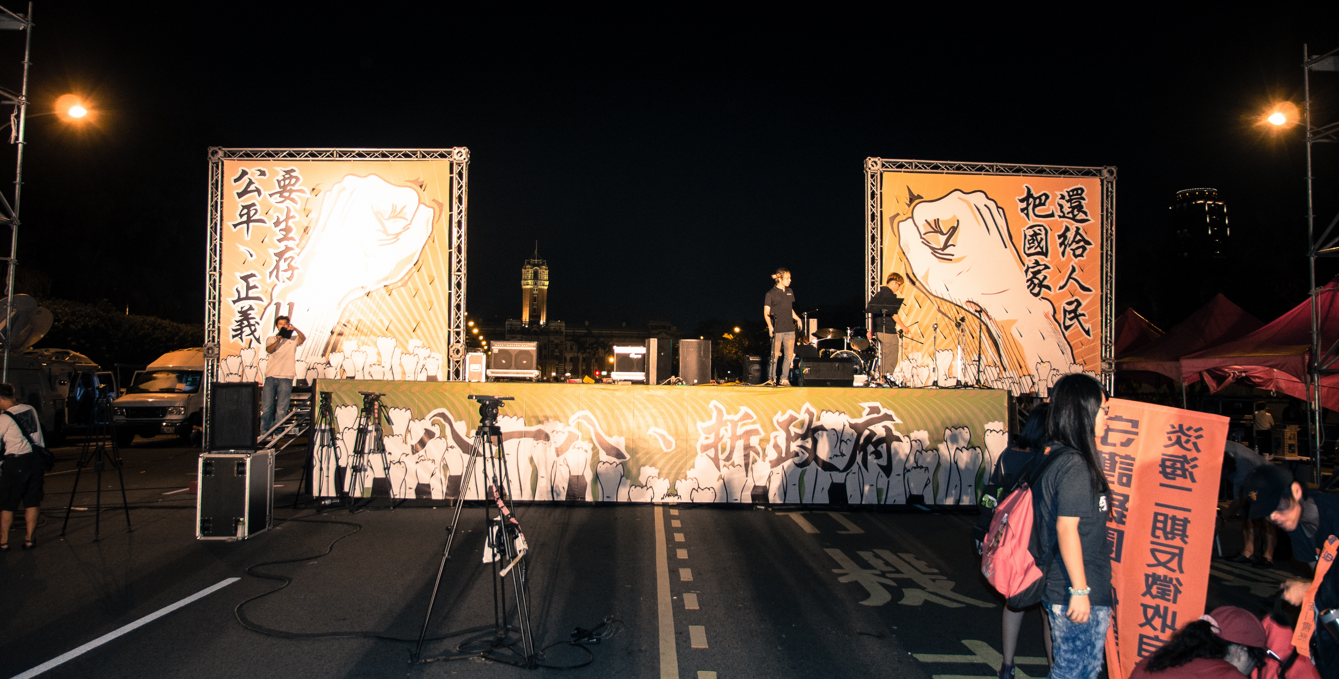 818 拆政府晚會